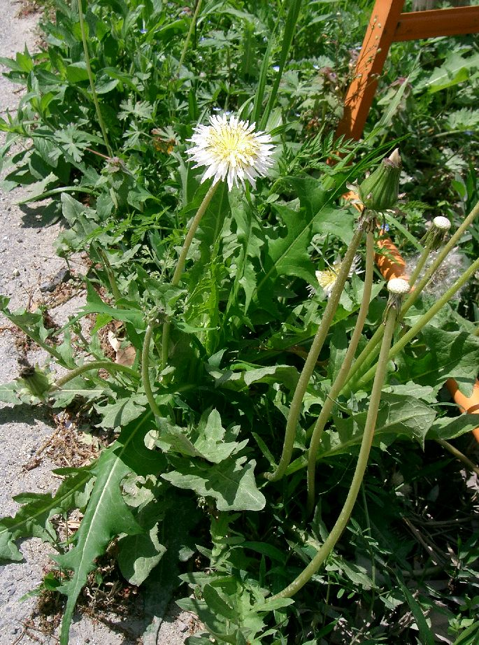 Taraxacum albidum